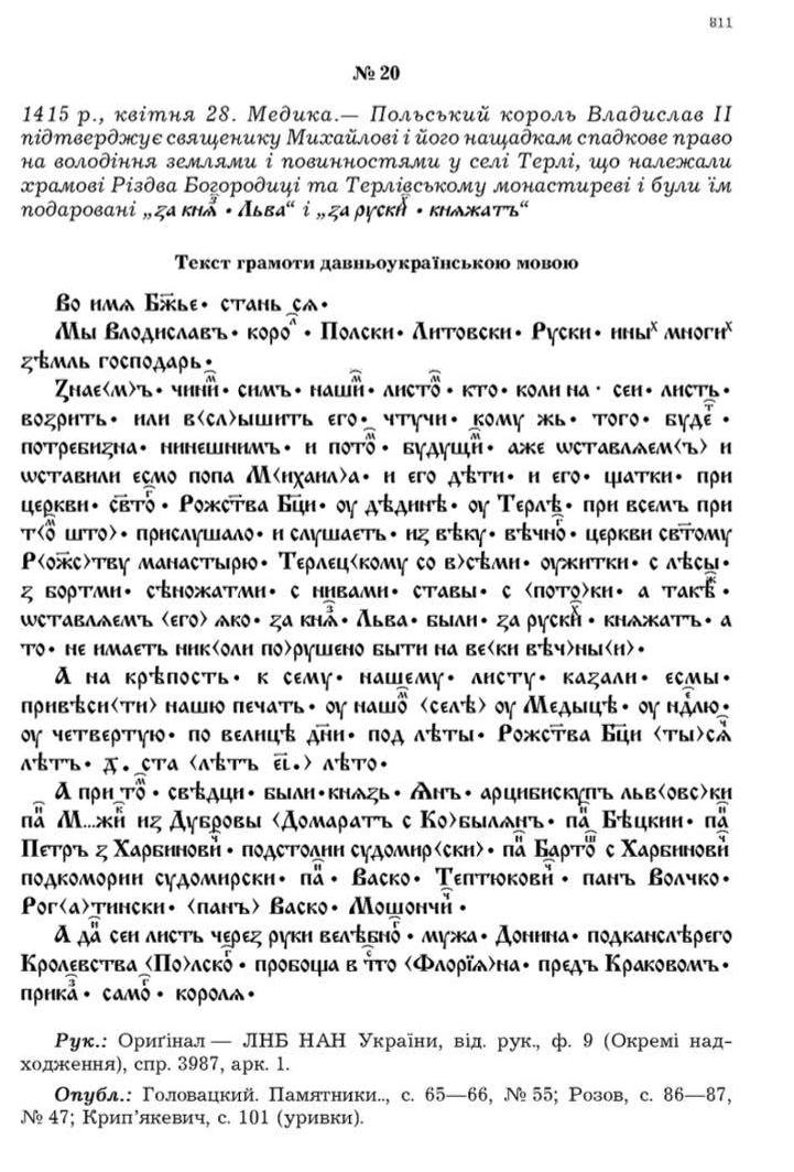 Текст привілею Владислава ІІ Ягайла від 28 квітня 1415 р. сталослав'янською мовою.